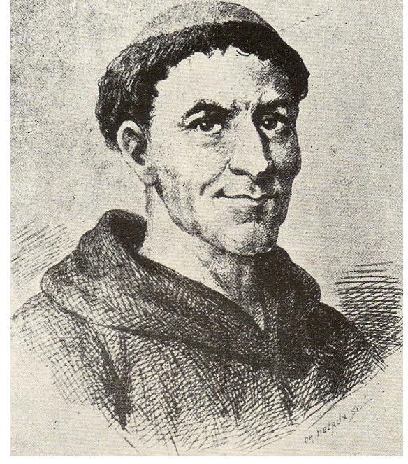 Retrato de Francisco de Castañeda, sacerdote argentino y periodista de la primera mitad del siglo XIX.